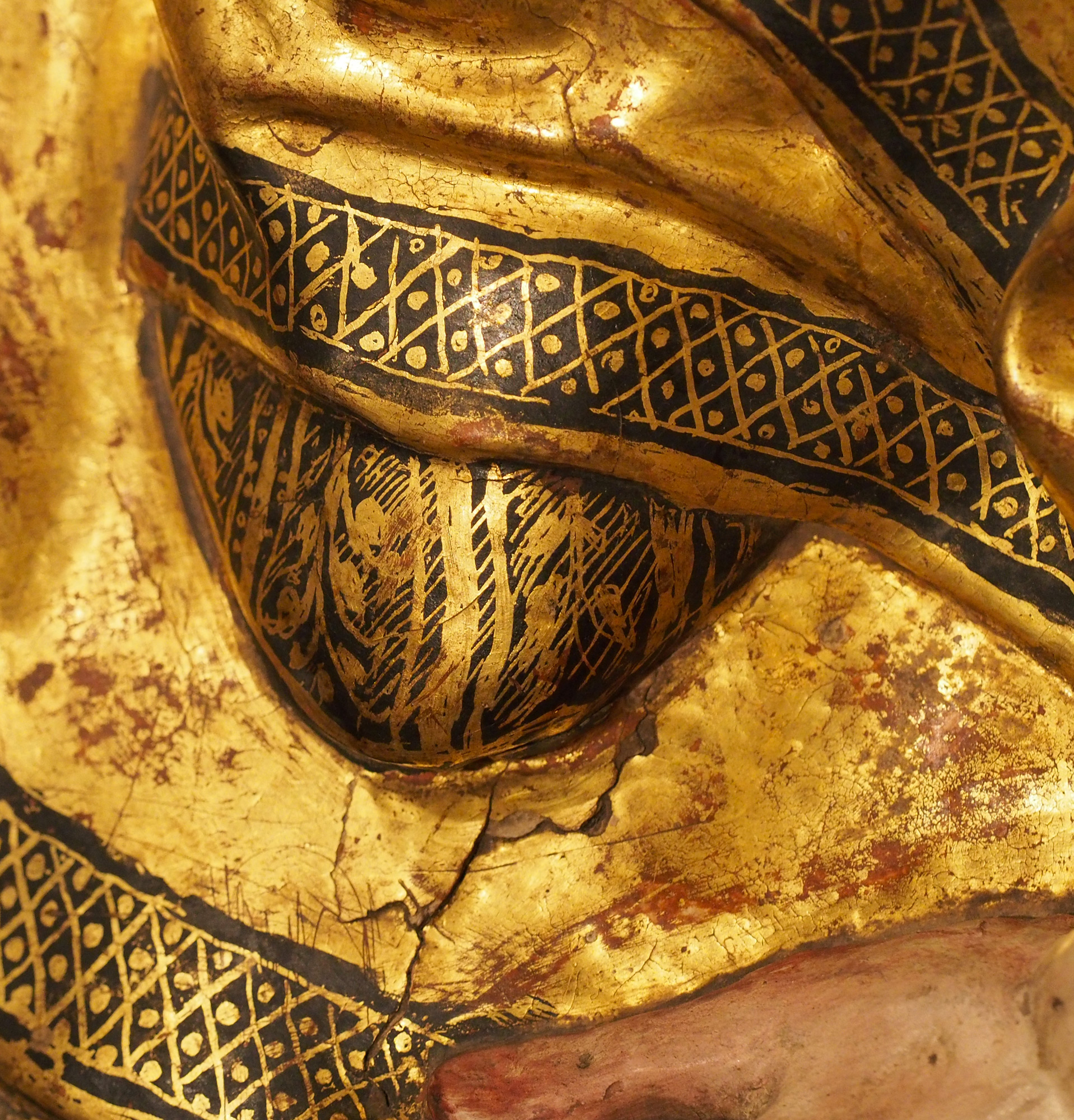 Muestra de estofado en escultura policromada. Detalle del pie de la Virgen en la Adoración de los Pastores del Retablo de San Benito, por Alonso Berruguete. Museo Nacional de Escultura, Valladolid.